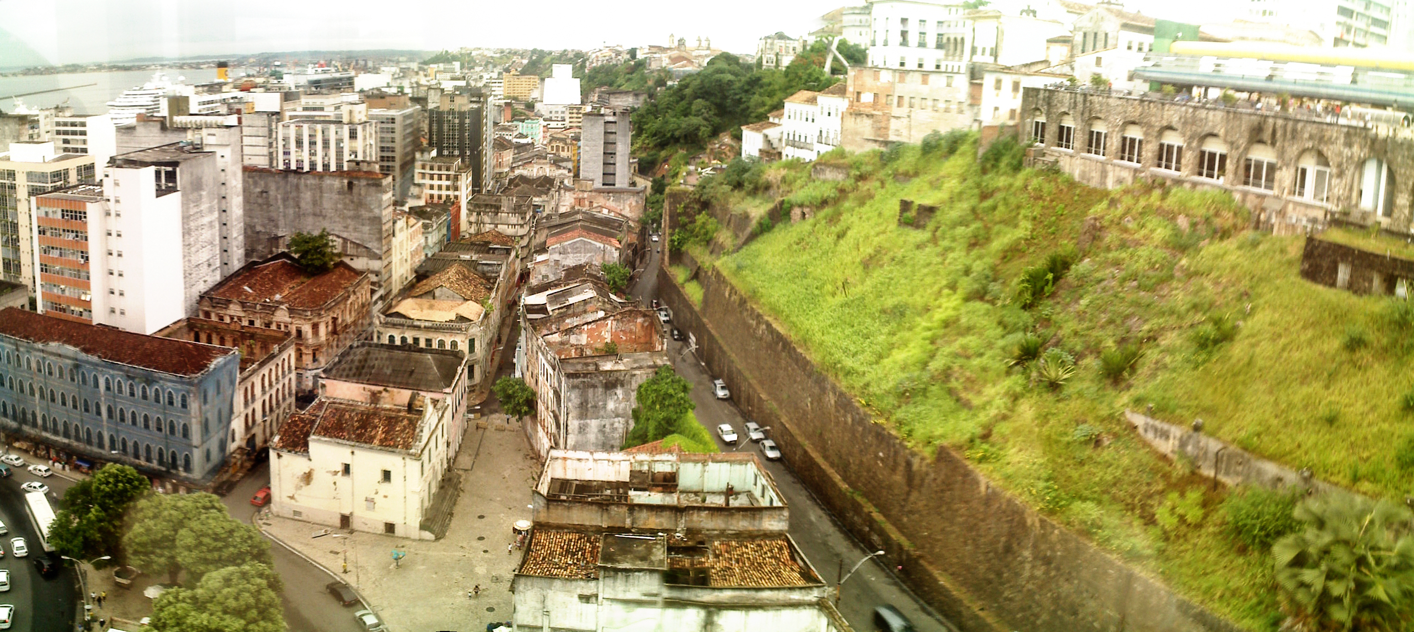 View from Elevador Lacerda Elevator Ascensor